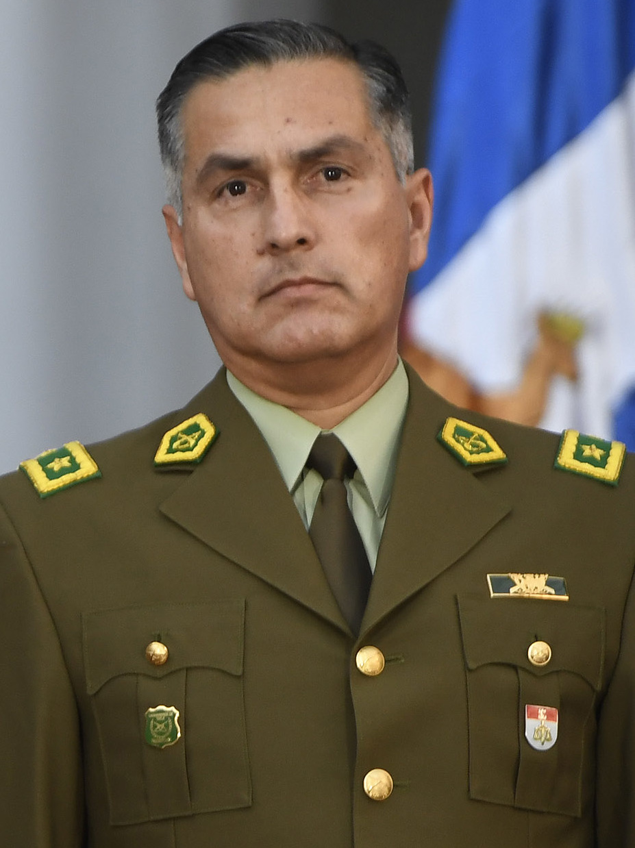 El Mandatario designó al General Mario Rozas Córdova al frente de la institución.